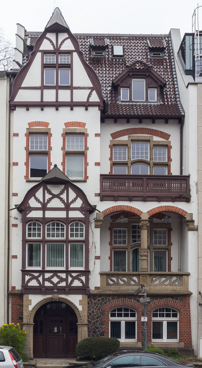 Villa (Gebäude 21 der Liegenschaft Adenauerallee Nord, Teil des Bundesrechnungshofs), Adenauerallee 85, Bonn